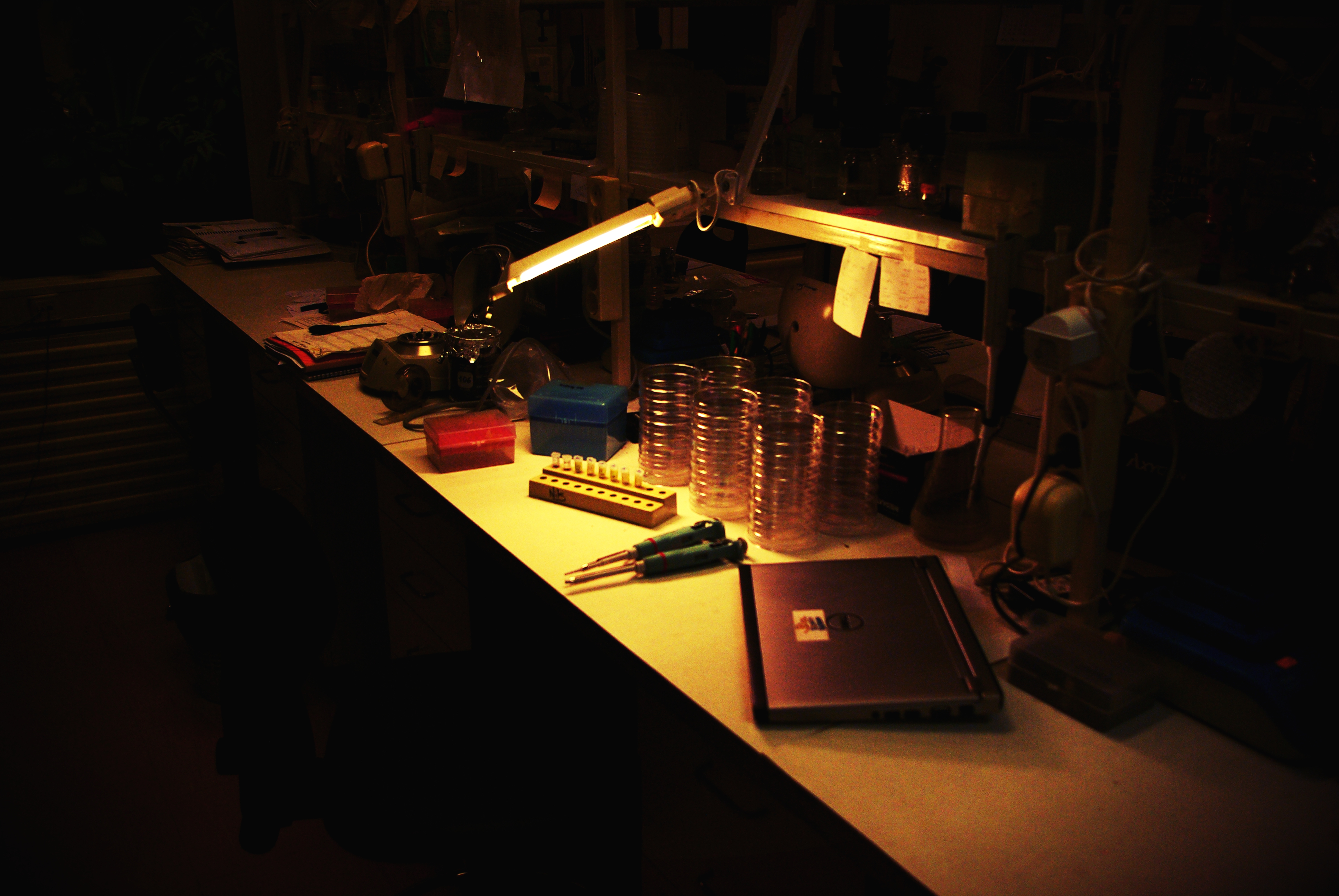 Vaade Tartu Ülikooli molekulaar- ja rakubioloogia mikroobigeneetika laboratooriumi töölaudadele, kus on parasjagu pooleli ettevalmistused P. putida transposoonmutageneesiks.